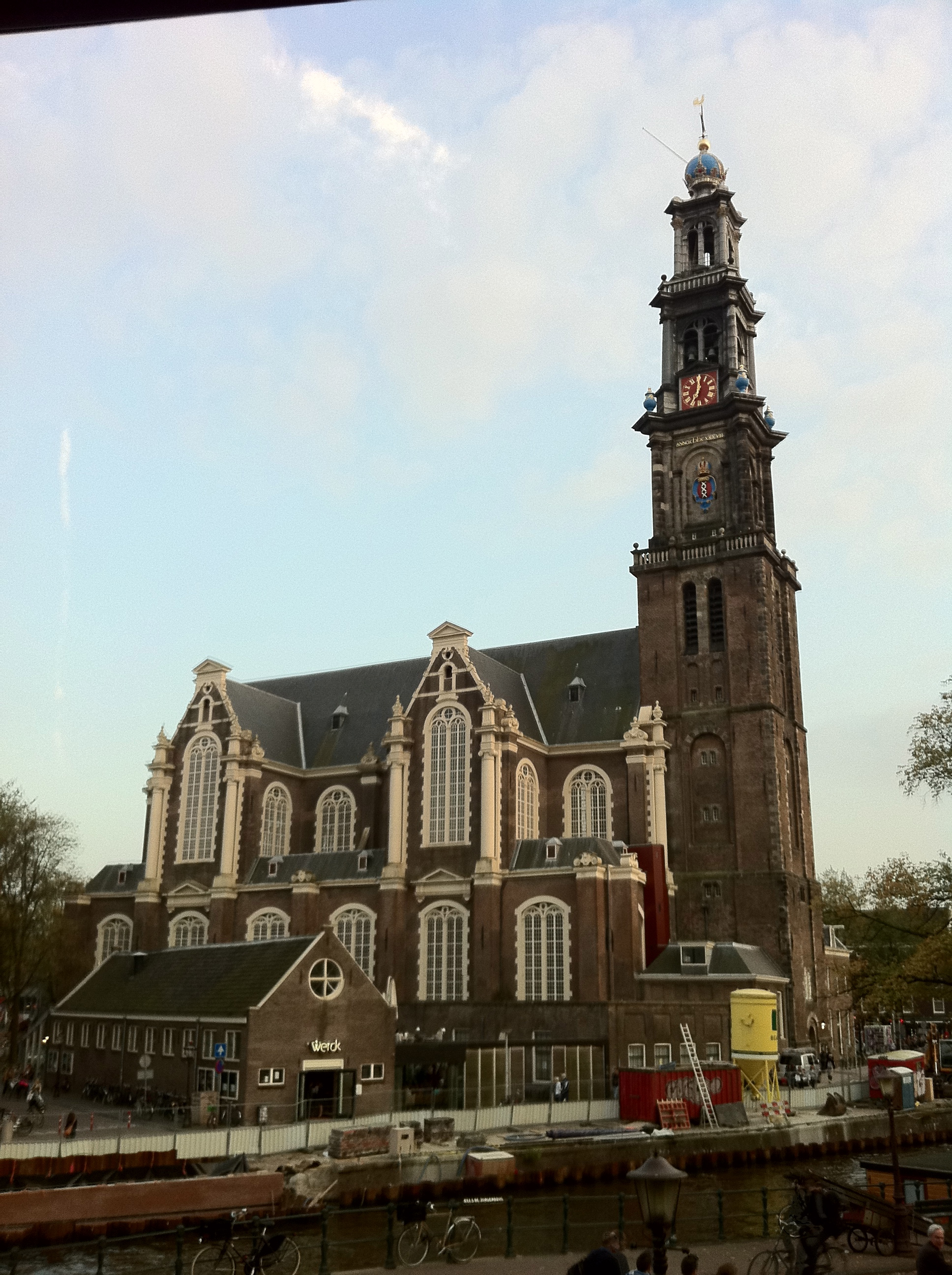 Westerkerk